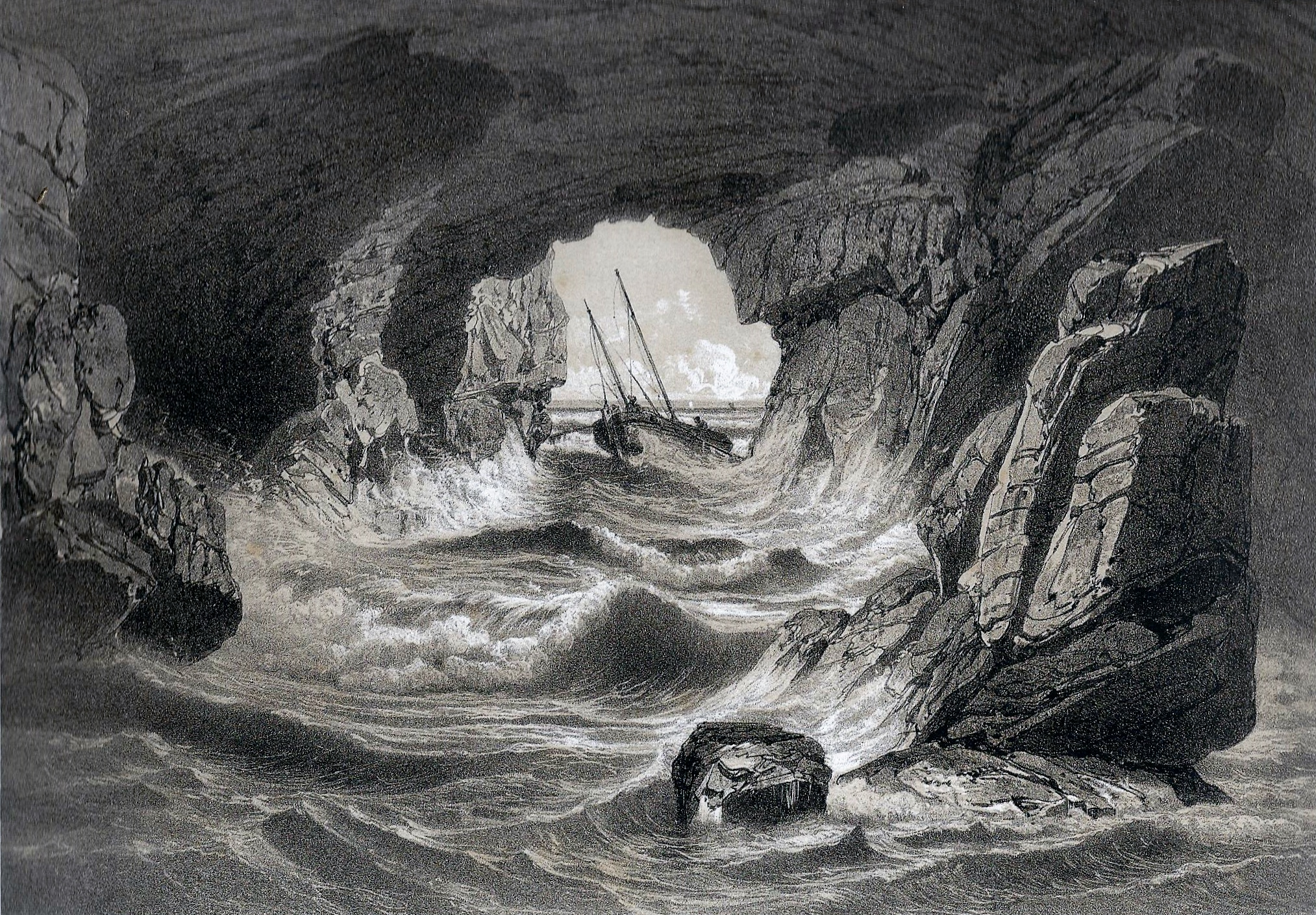 "Grotte de l'autel à Morgat près de Crozon" (dessin de Félix Benoist publié dans Félix Benoist, "La Bretagne contemporaine", tome "Finistère", 1867)